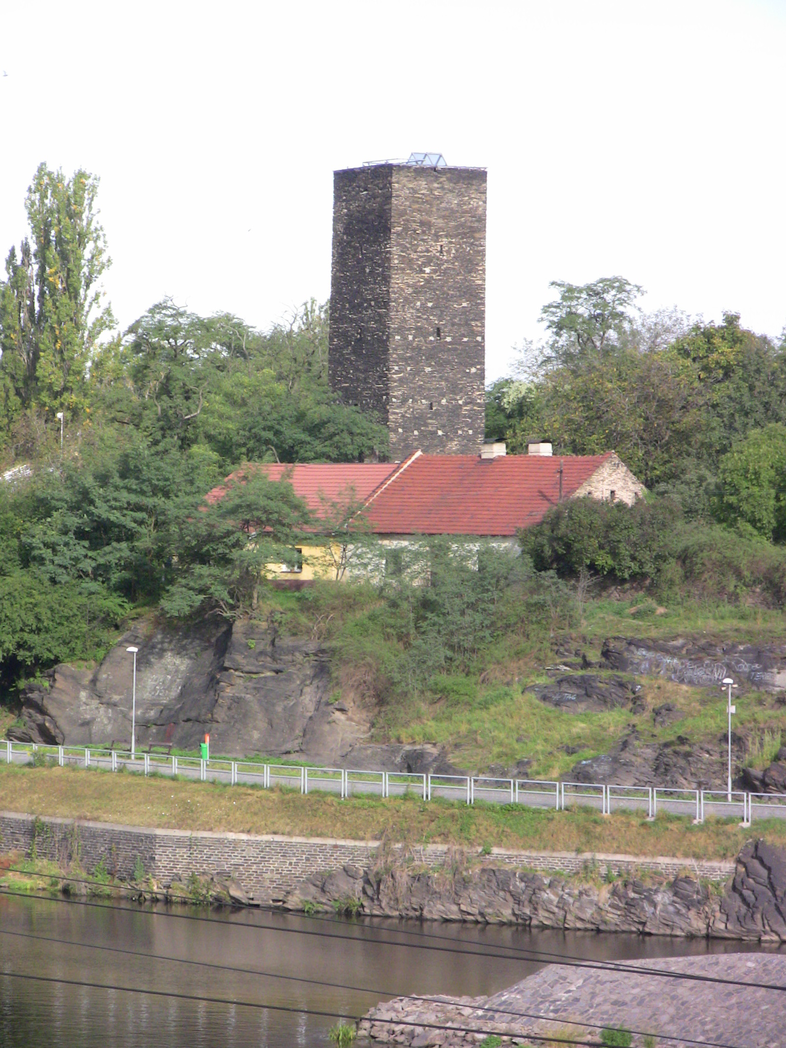 Městské opevnění - strážní věž Práchovna (Kolín), západně od mostu Ant. Kaliny, pravý břeh Labe, Kolín